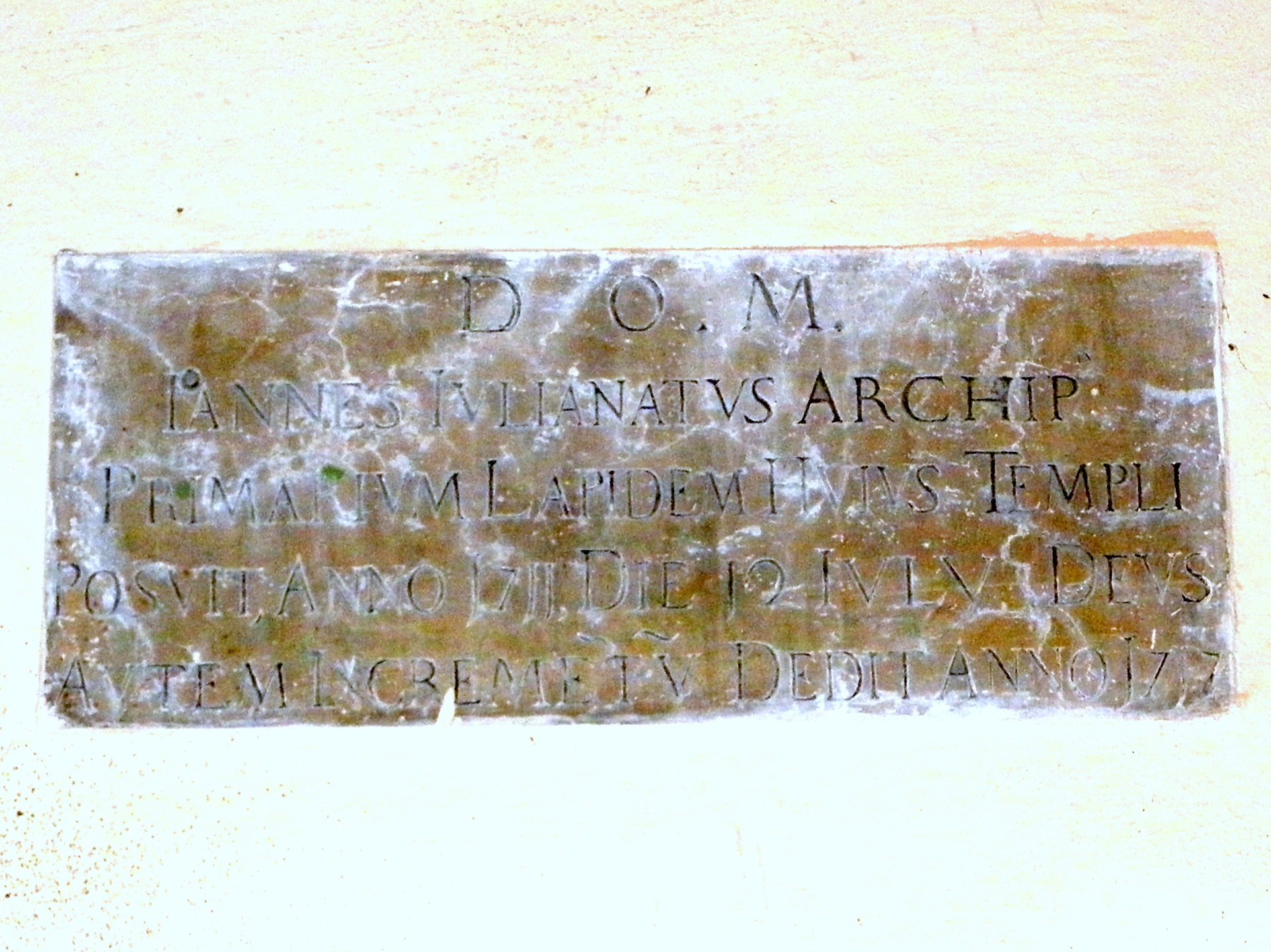 Gavello, chiesa parrocchiale della Beata Vergine delle Grazie: una delle lapidi murate all'interno della chiesa.